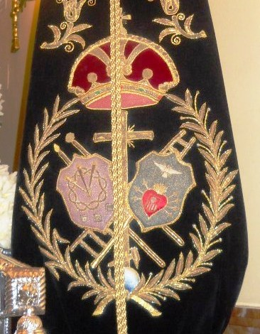 Escudo que aparece en el bacalao de la hermandad